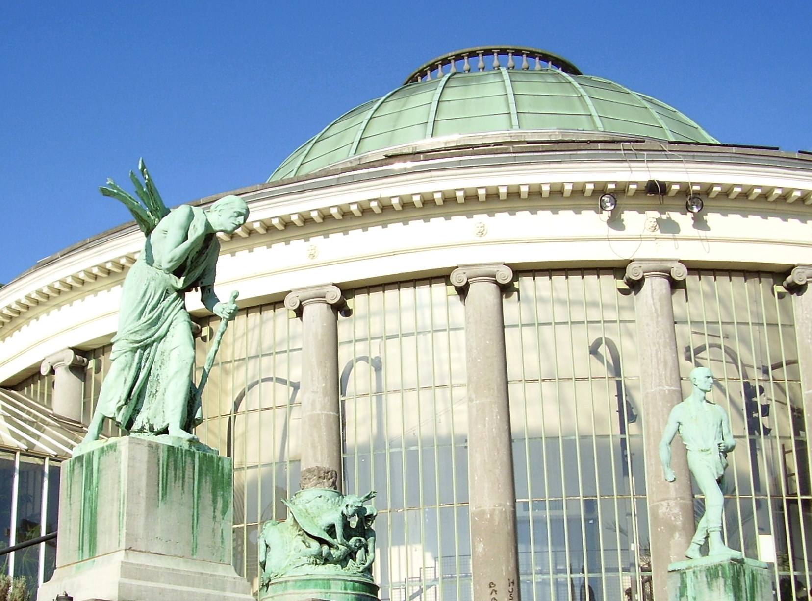 Description: Le Botanique, Saint-Josse-ten-Noode (Bruxelles) Author: User:Ben2 Date of creation: 22 juin 2006 Source: Photo personnelle